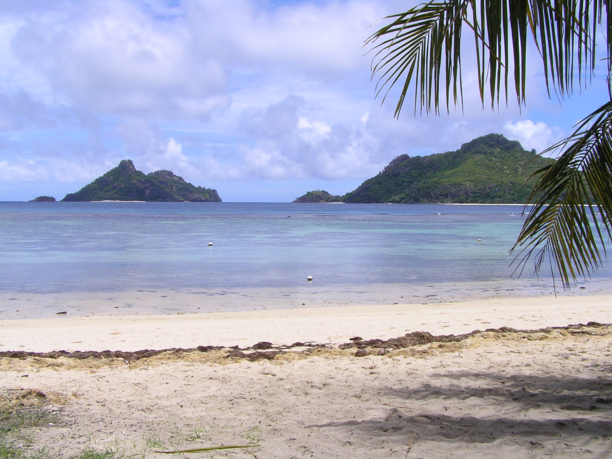 Mamanuca Islands